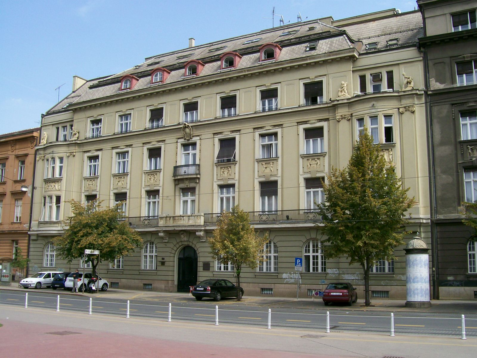 Hrvatska gospodarska komora Croatian Chamber of Economy